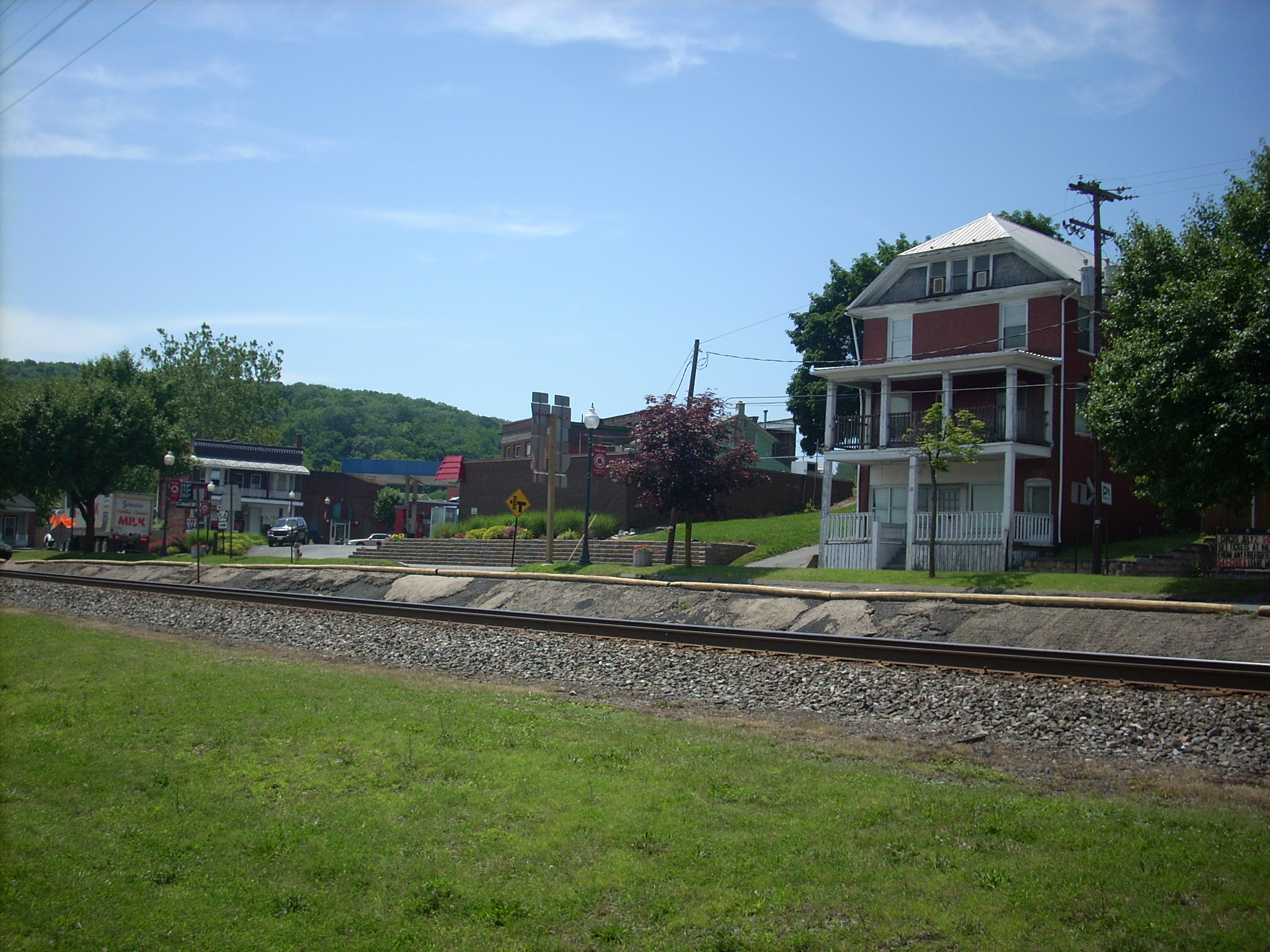 Montgomery, Pennsylvania